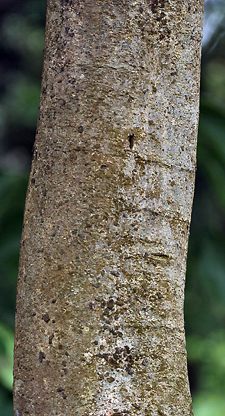 Amaltas - Indian Laburnum Cassia fistula in Kolkata, West Bengal, India.